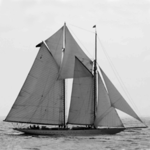 Westward - Nathanael G Herreshoff - 1910 - Vignette Carrée